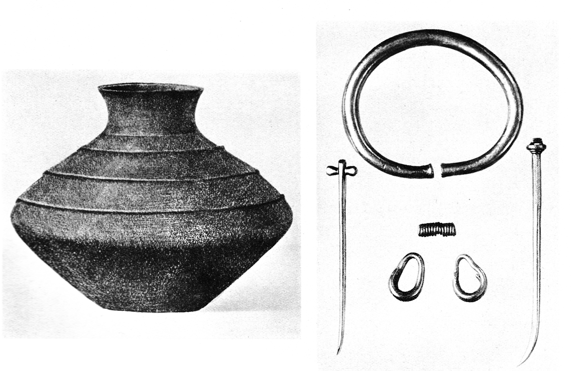 Funde aus dem Fürstengrab von Helmsdorf